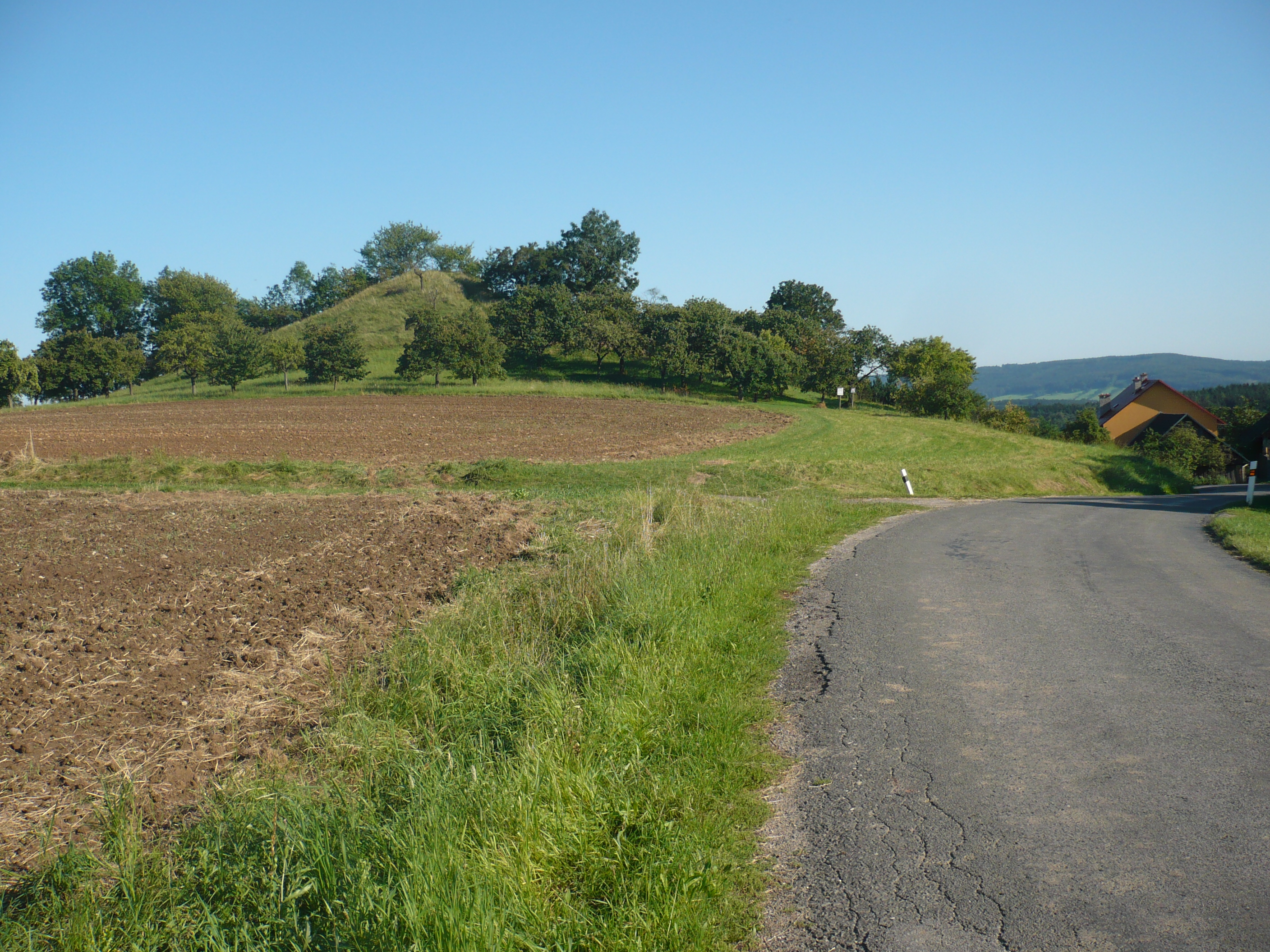 Přírodní památka Hřídelecká hůra - pohled na severozápadní úbočí